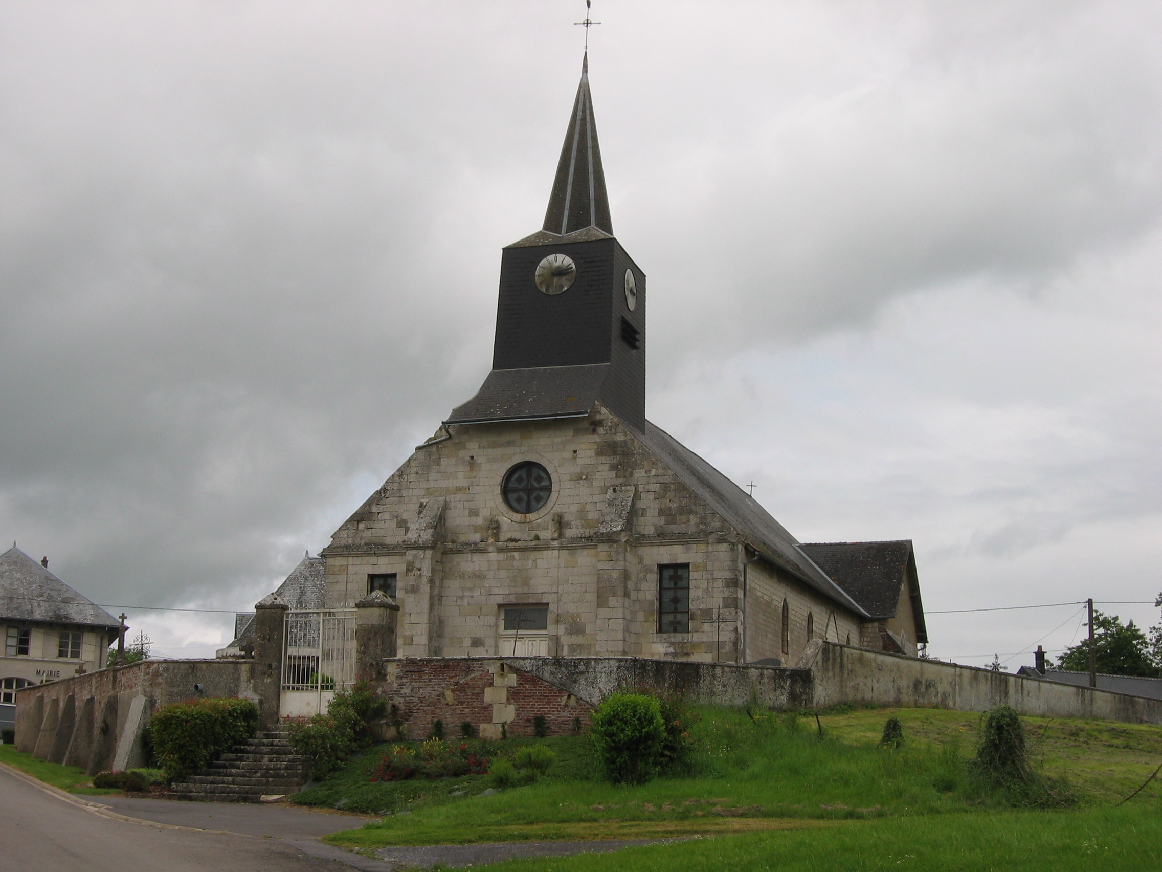 Église d'Hannogne-Saint-Remy Ardennes France